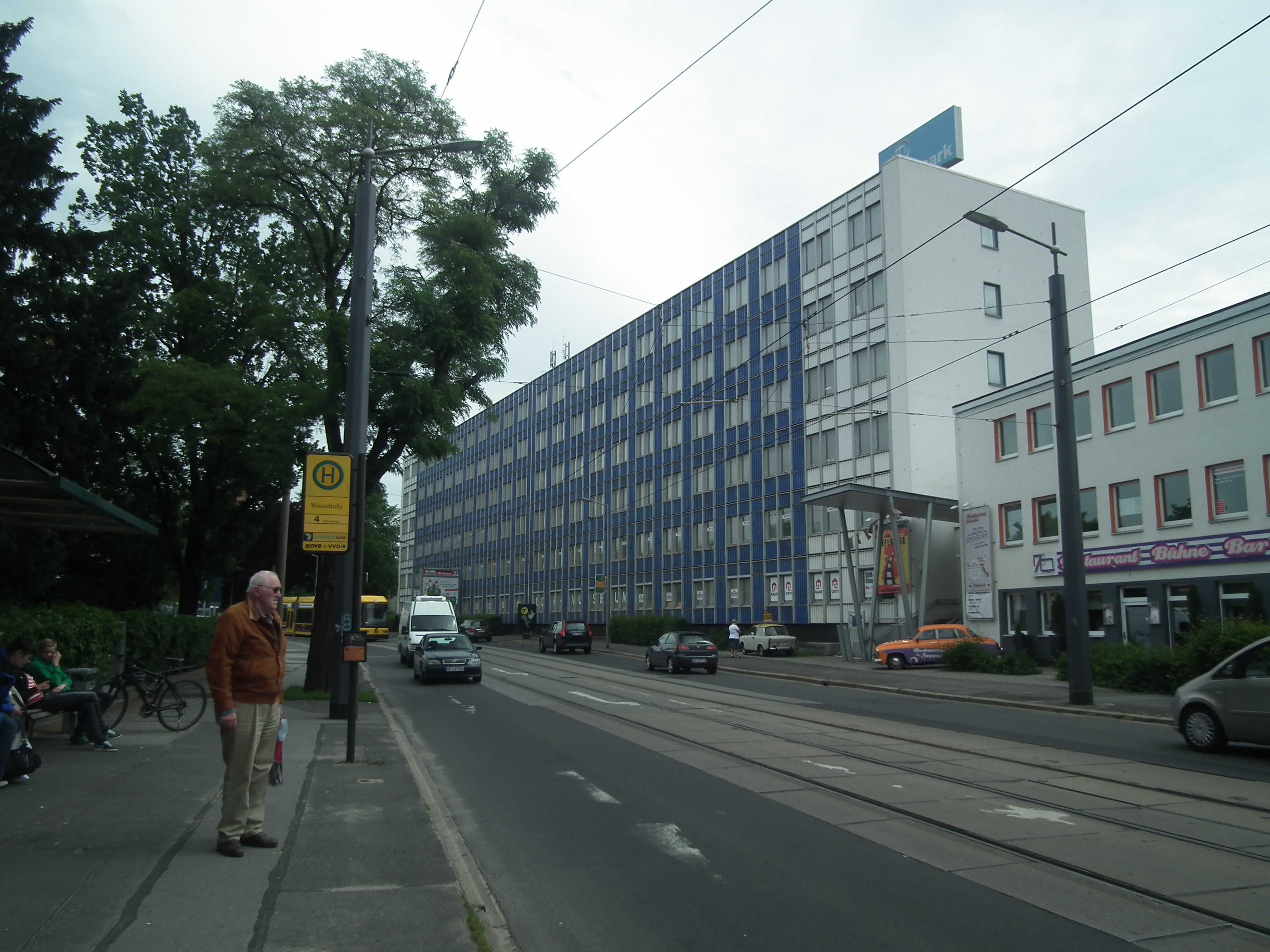 DDR-Museum Zeitreise in Radebeul, Außenansicht, Meißner Straße